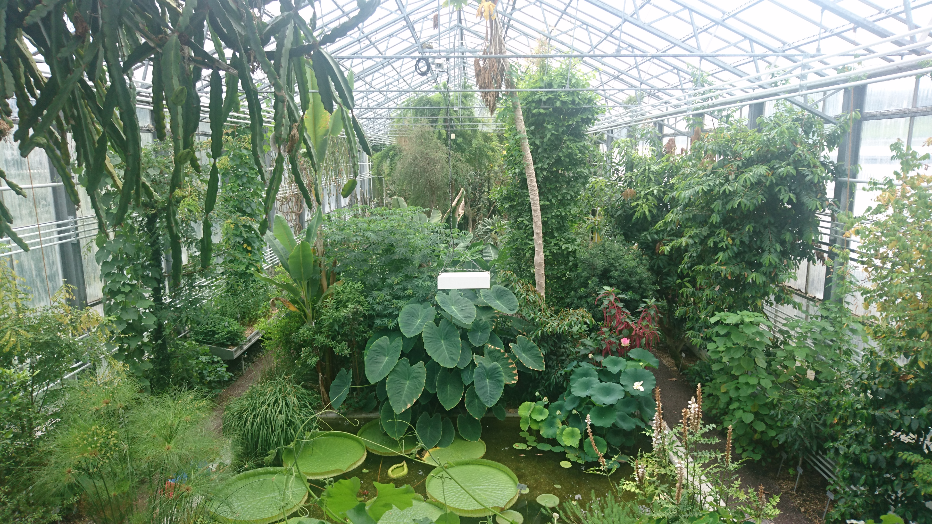 Blick in das Tropenhaus des Botanischen Gartens St. Gallen von der Balustrade des Eingangsbereiches aus gesehen.